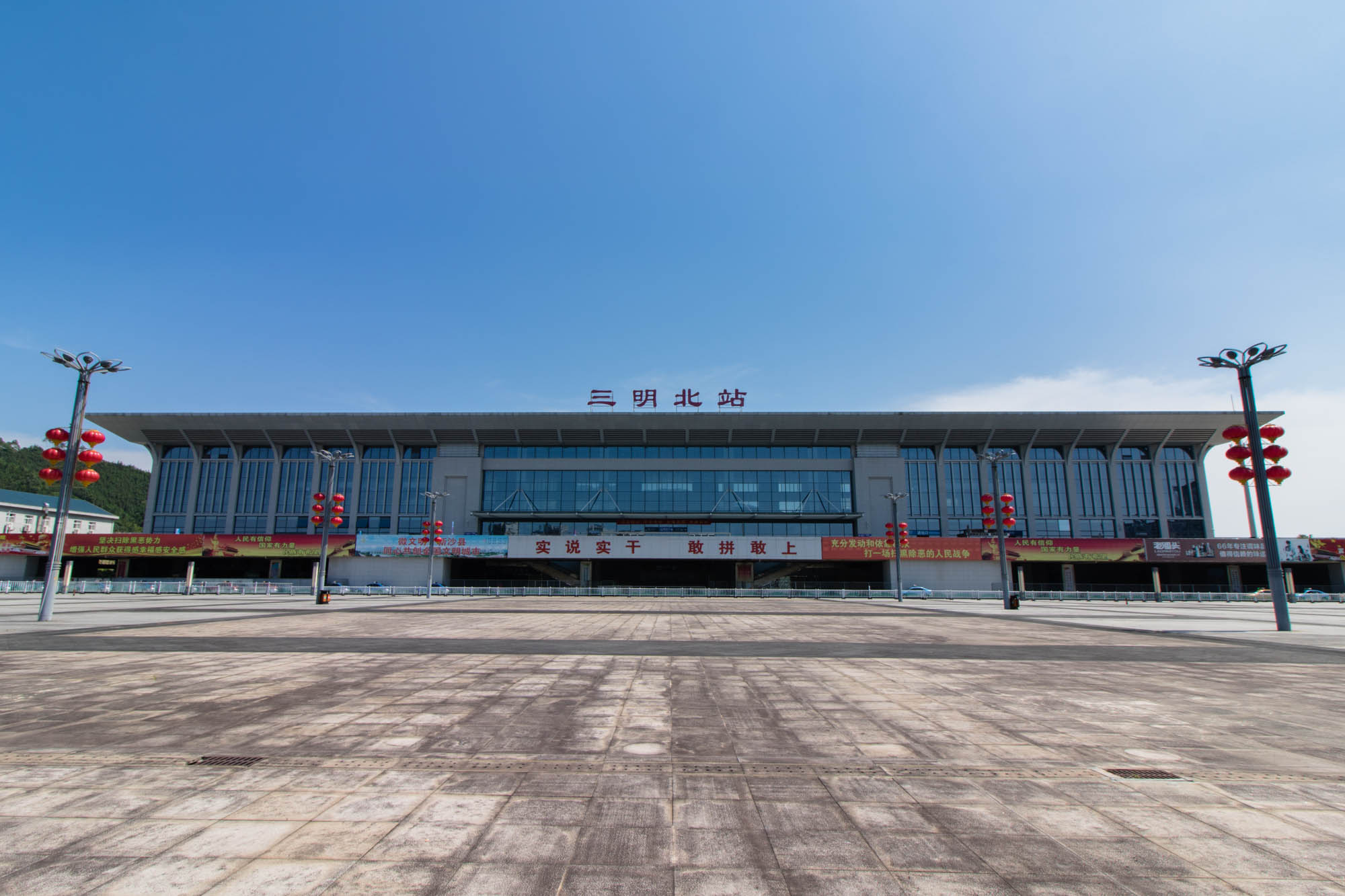 中文（中国大陆）: 三明北站站房外观